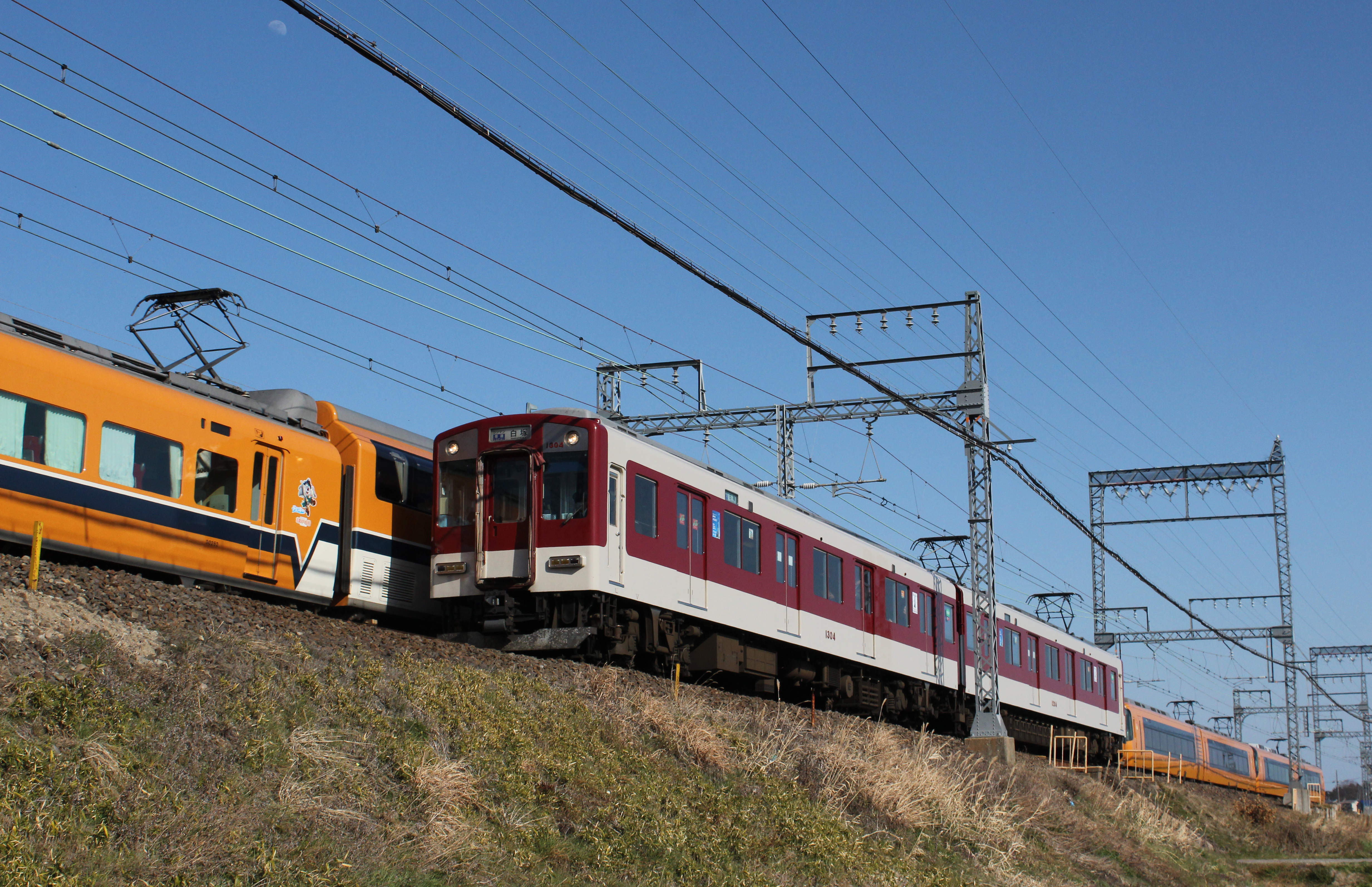 近鉄1200系 漕代駅-櫛田駅間